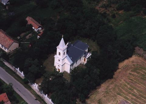 Tiszagyenda, Hungary, aerialphotgraphy. Szent Mihály főangyal római katolikus templom